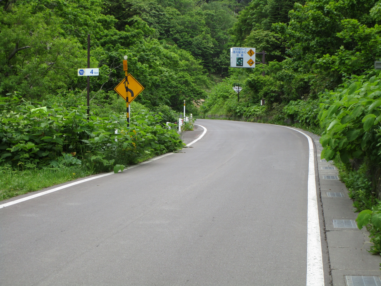 北海道道765号元地香深線（礼文町香深村より撮影）